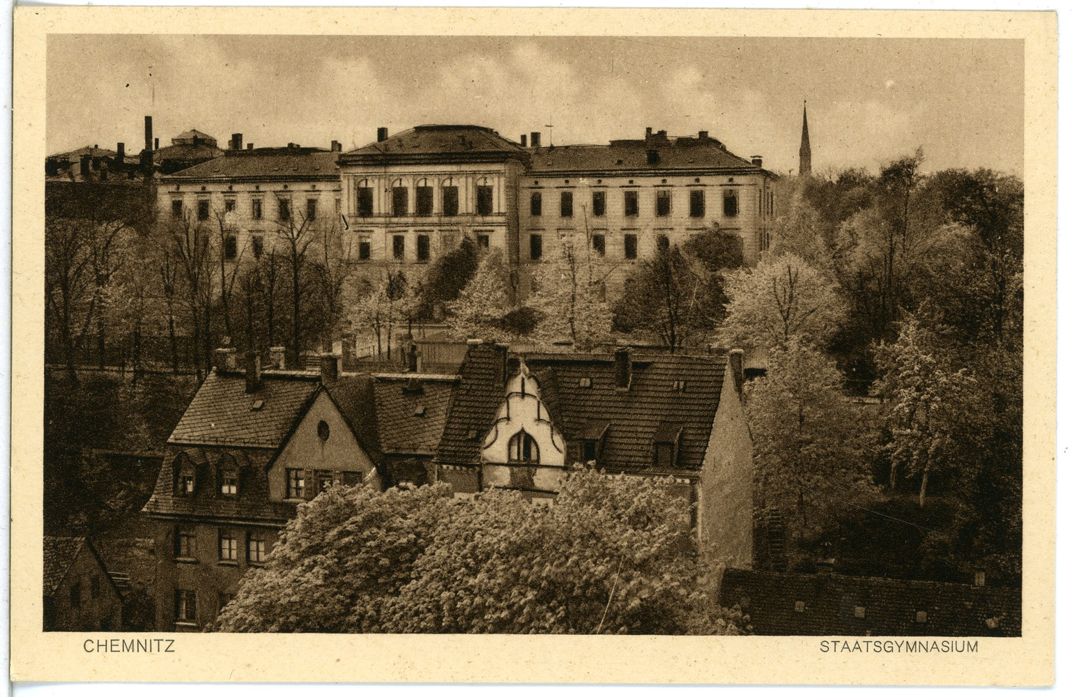 Chemnitz; Staatsgymnasium, heute ein Gebäude des Karl-Schmidt-Rottluff-Gymnasiums This postcard is from publisher Brück & Sohn in Meißen ( postcard has a unique number 23136 and is available in a higher resolution at the publisher. This images was uploaded in a cooperation project between Wikipedians and the publisher.